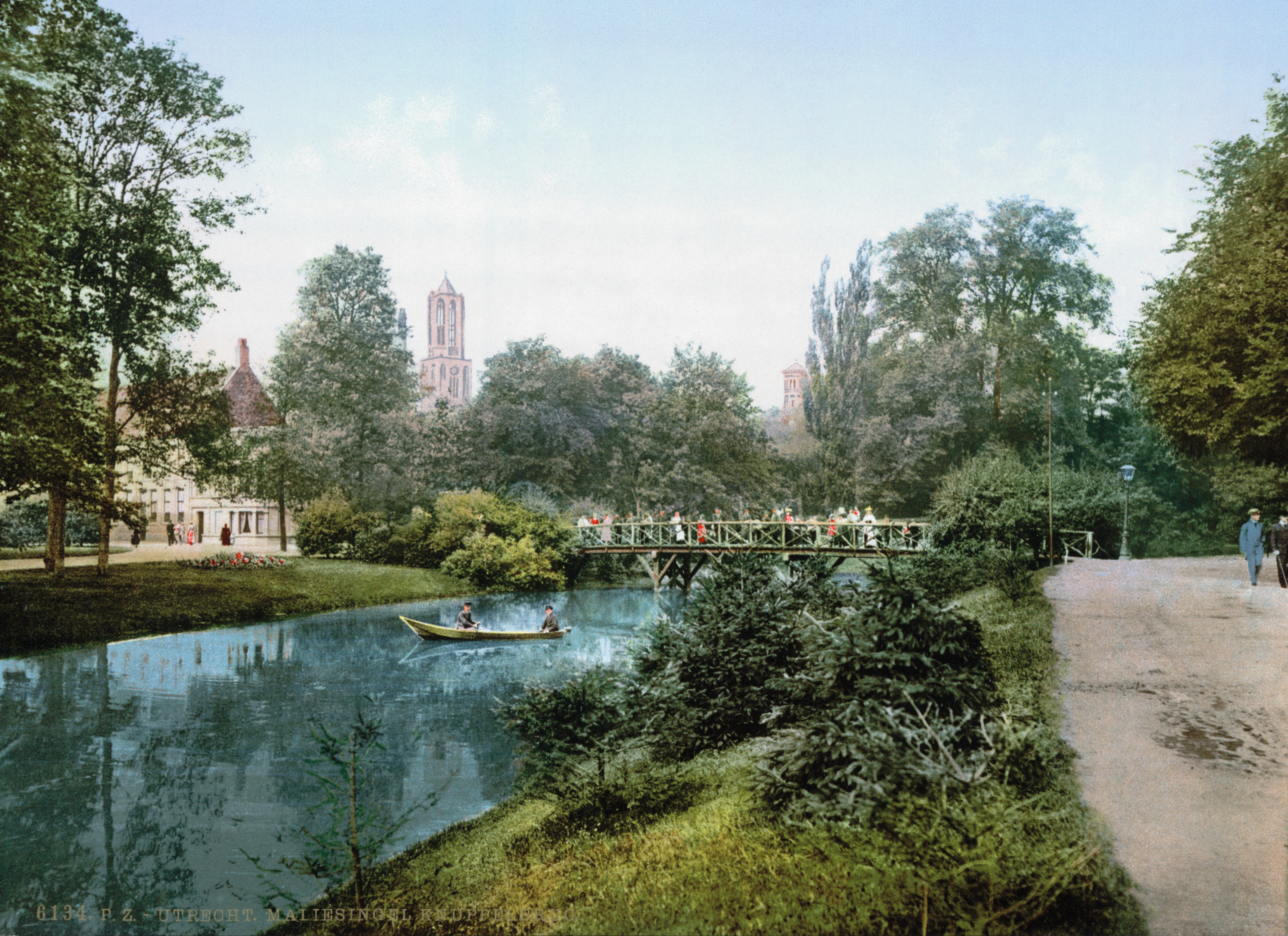 Utrecht - Maliesingel en Knuppelbrug, foto genomen ter hoogte van de Herenbrug over de Stadsbuitengracht